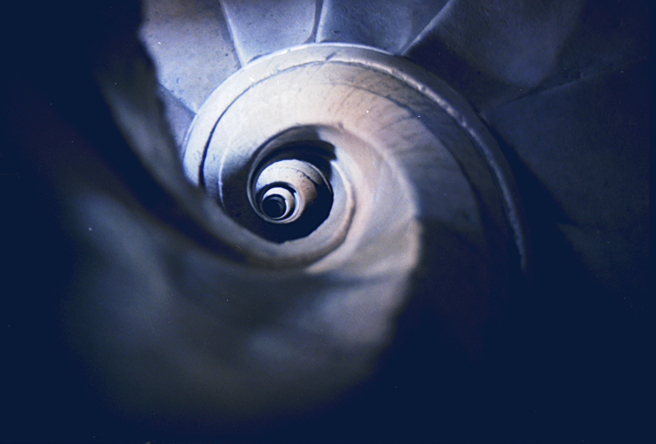 Fotografía del Caracol de la Iglesia de Alustante.